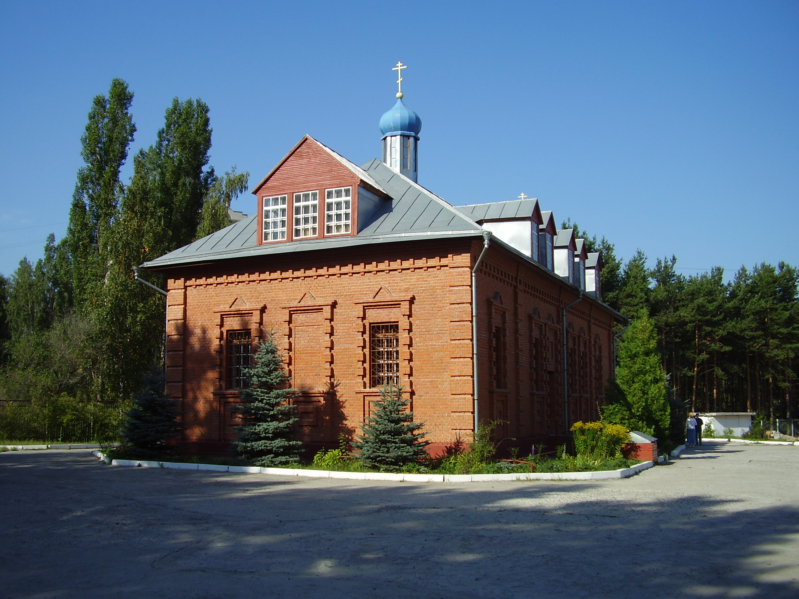 Воронеж,Придонской, Церковь_Великомученика_Пантелеимона